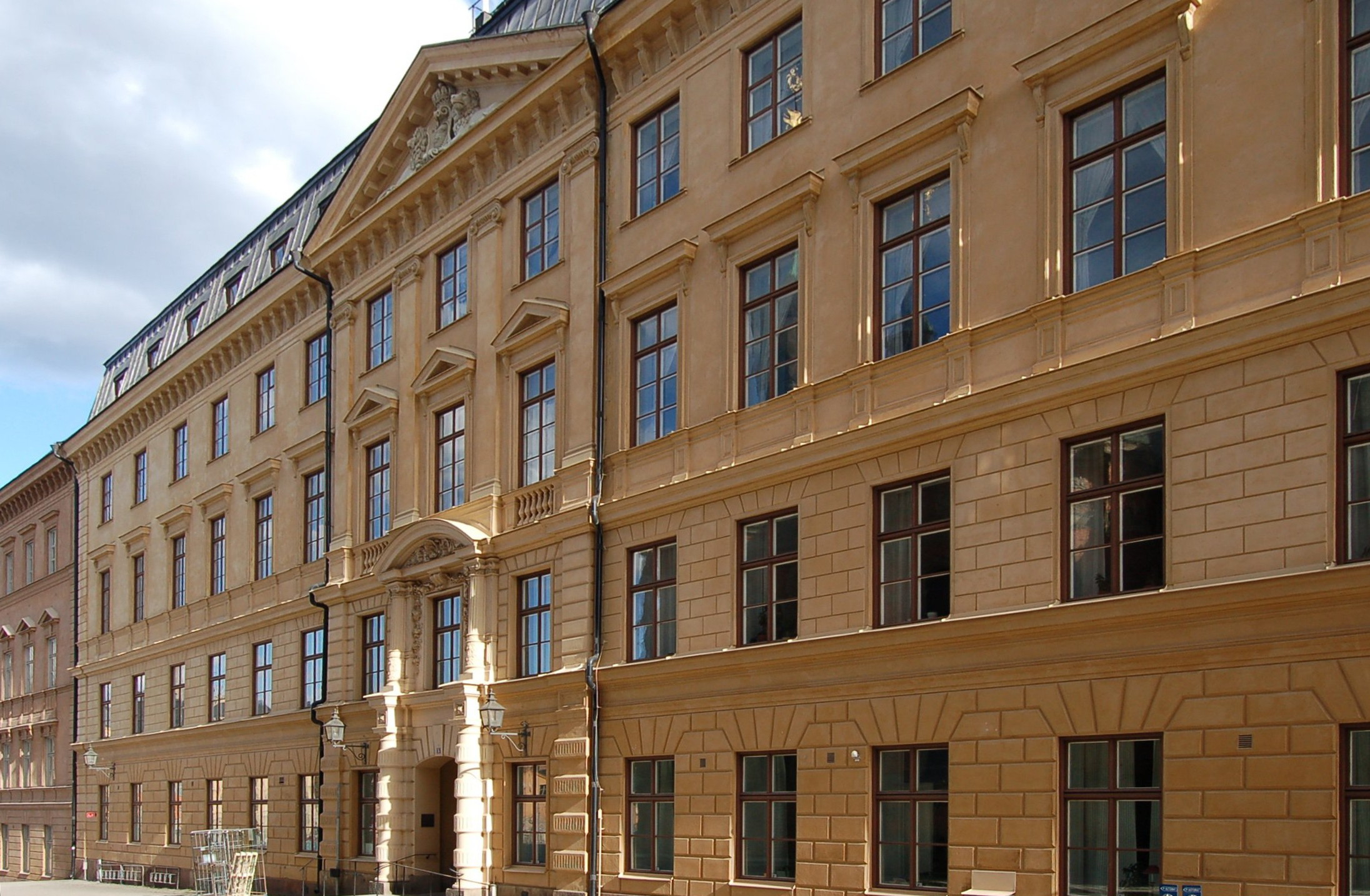 Gamla Riksdagshuset i Stockholm från Birger Jarls torg. Inhyser idag Stockholms kammarrätt.